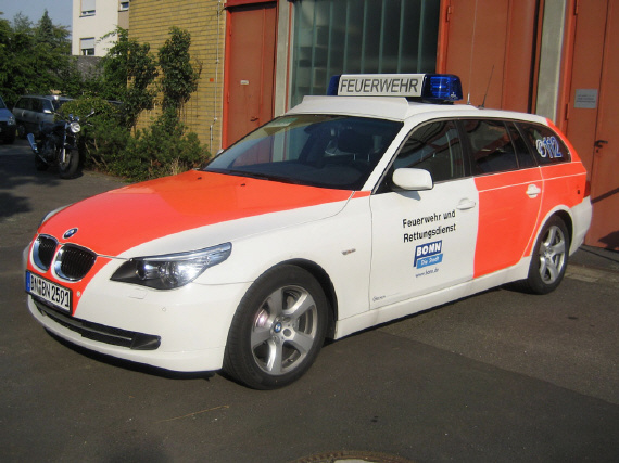 Einsatzfahrzeug des Leitenden Notarztes